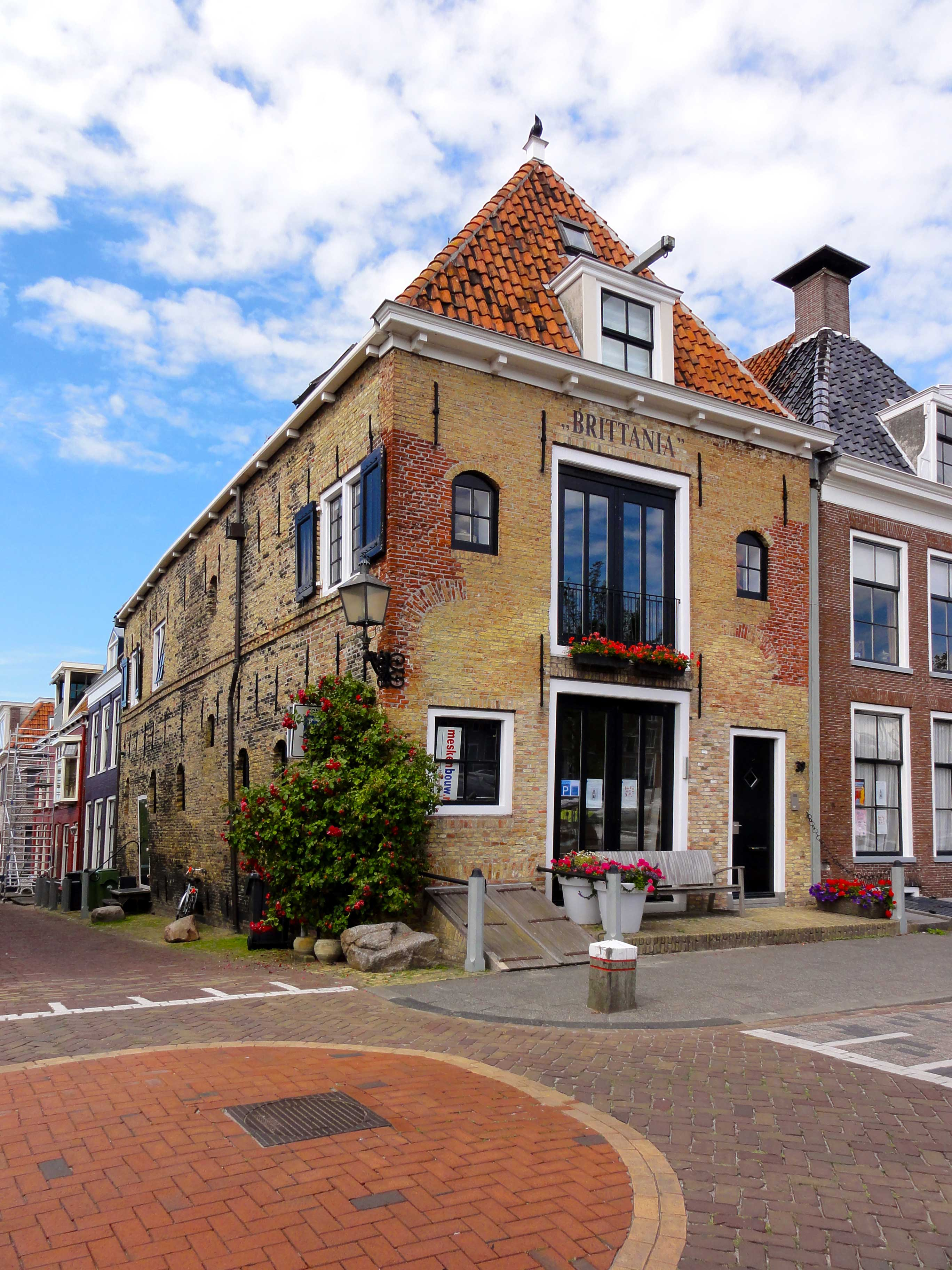 Brittania Noorderhaven 39 in Harlingen